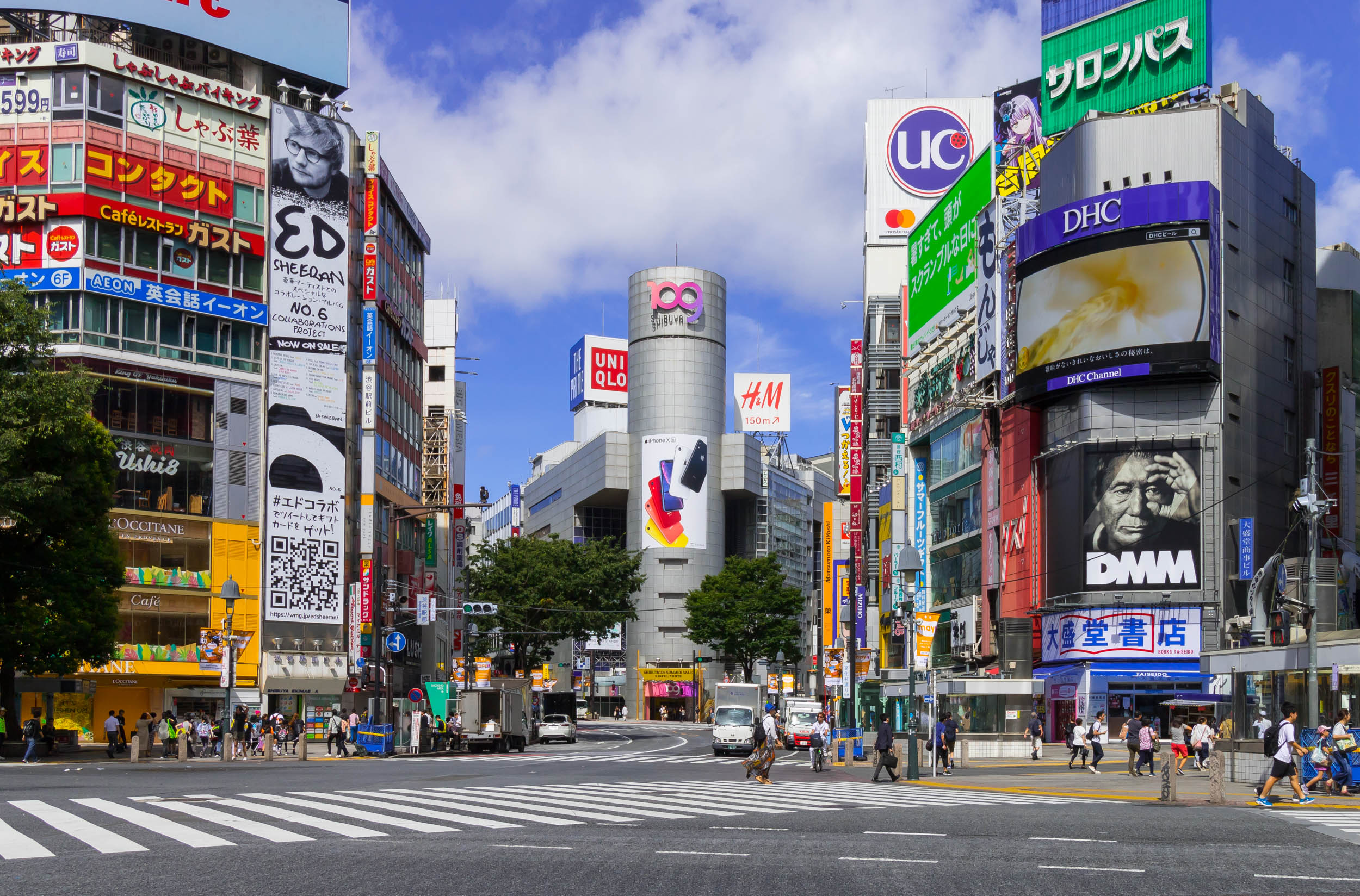 渋谷109